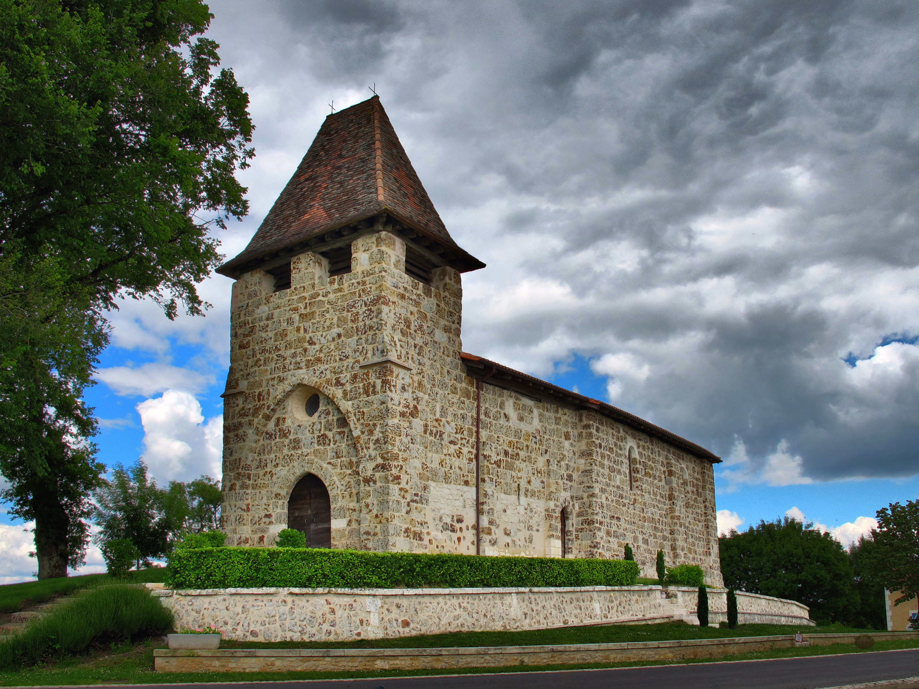 Église Saint-André .